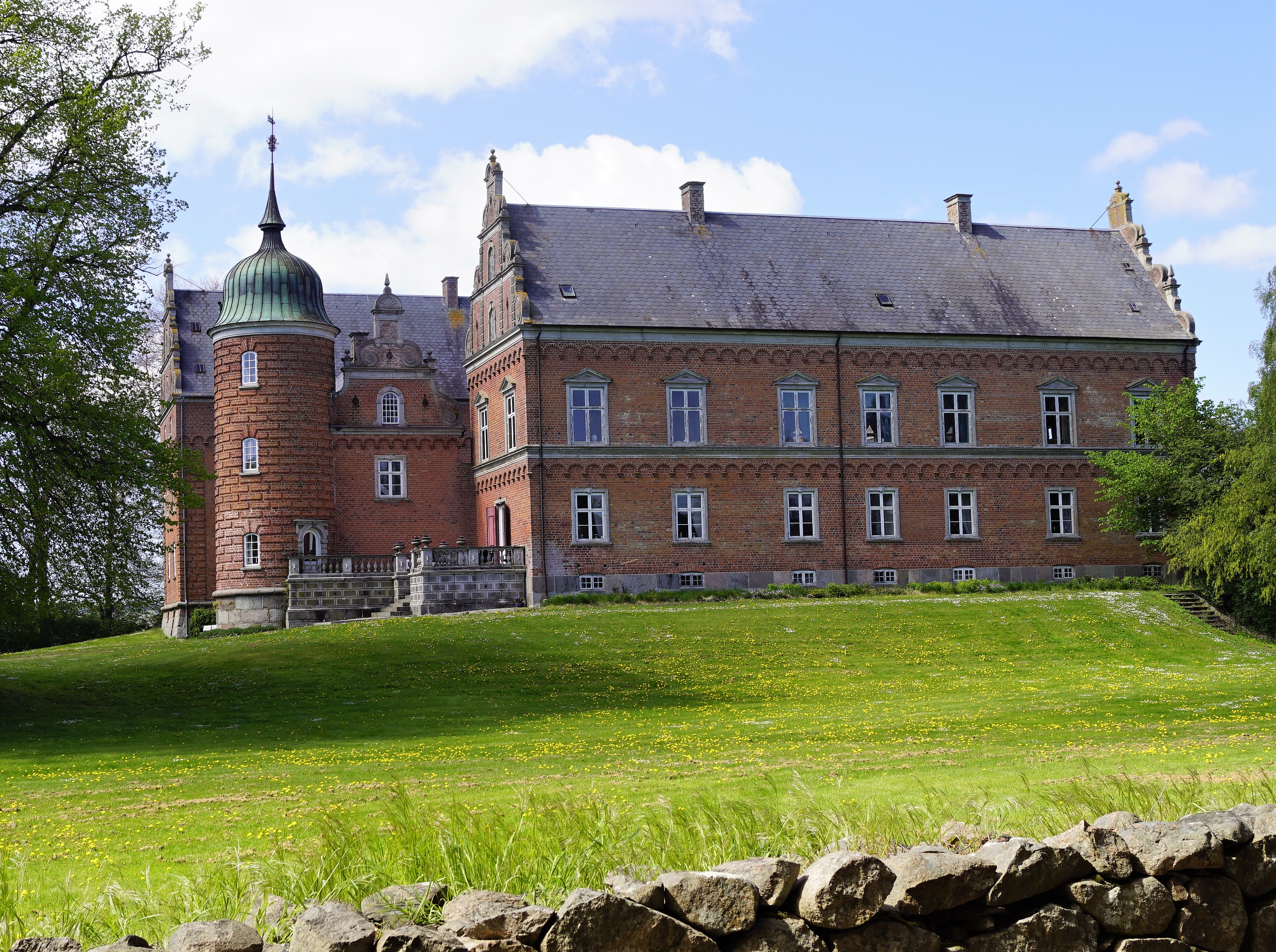 Arreskov set fra øst